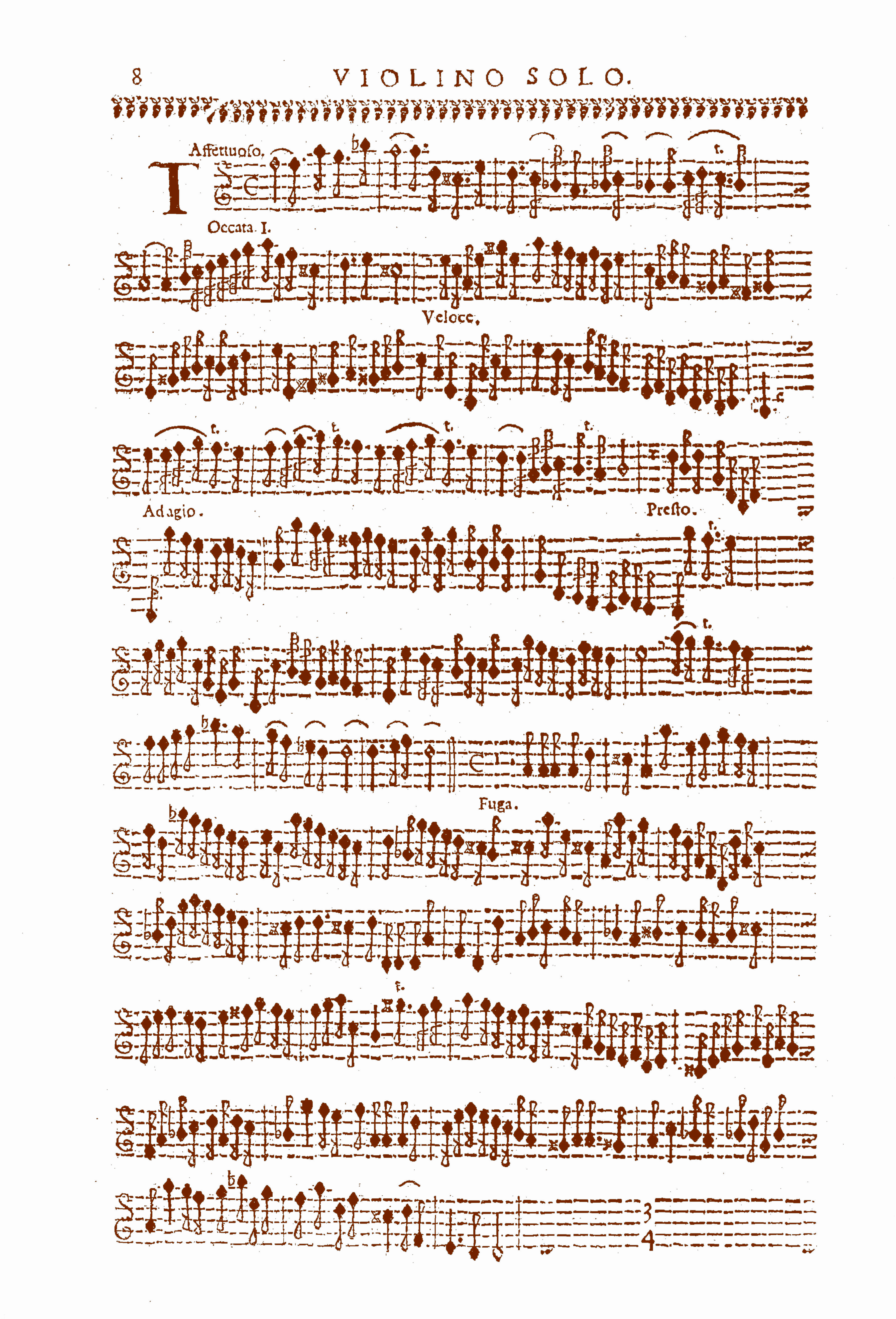 La toccata prima, extraite des Capricci armonici da chiesa e da camera de Viviani.